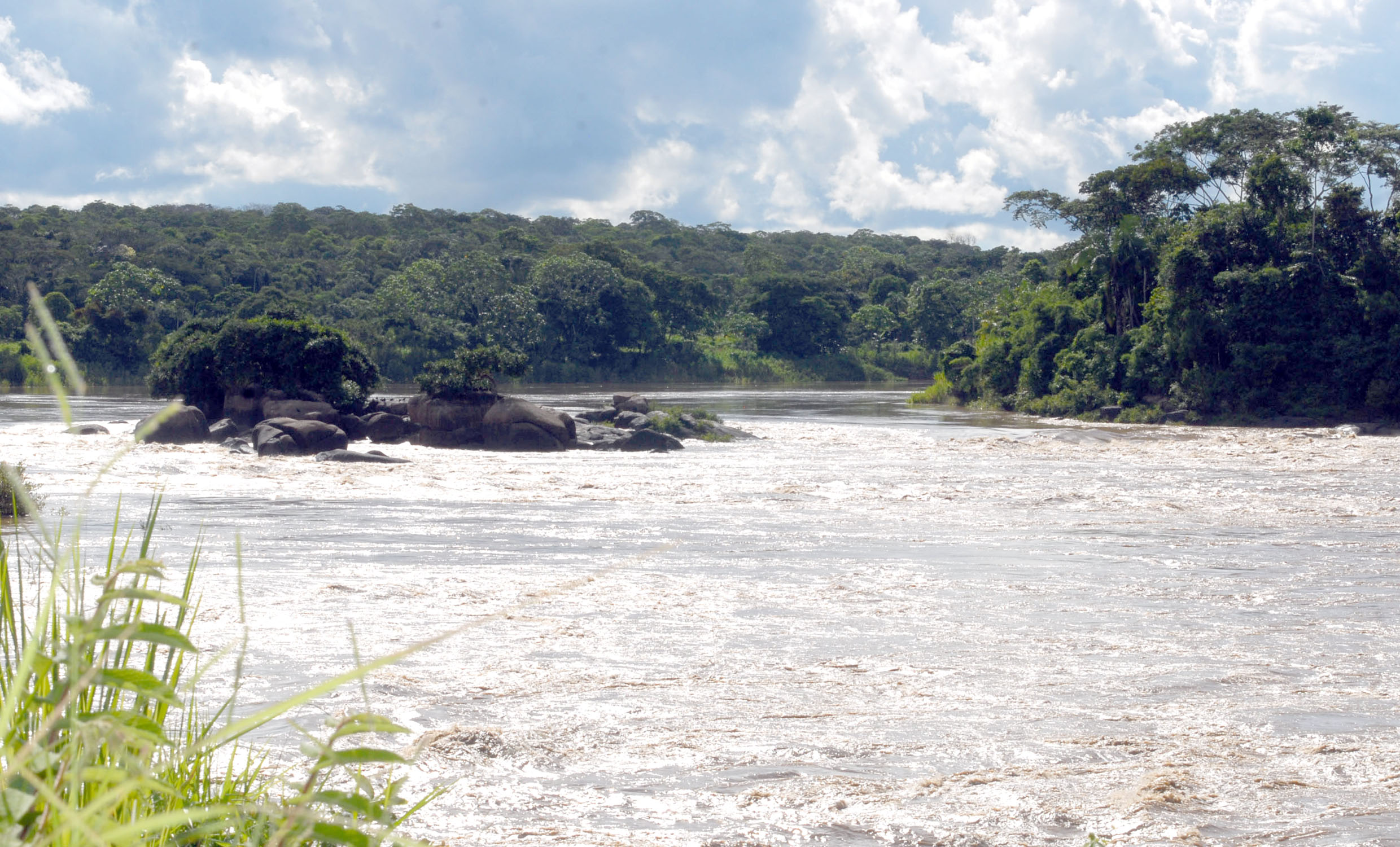 Rio Madeira